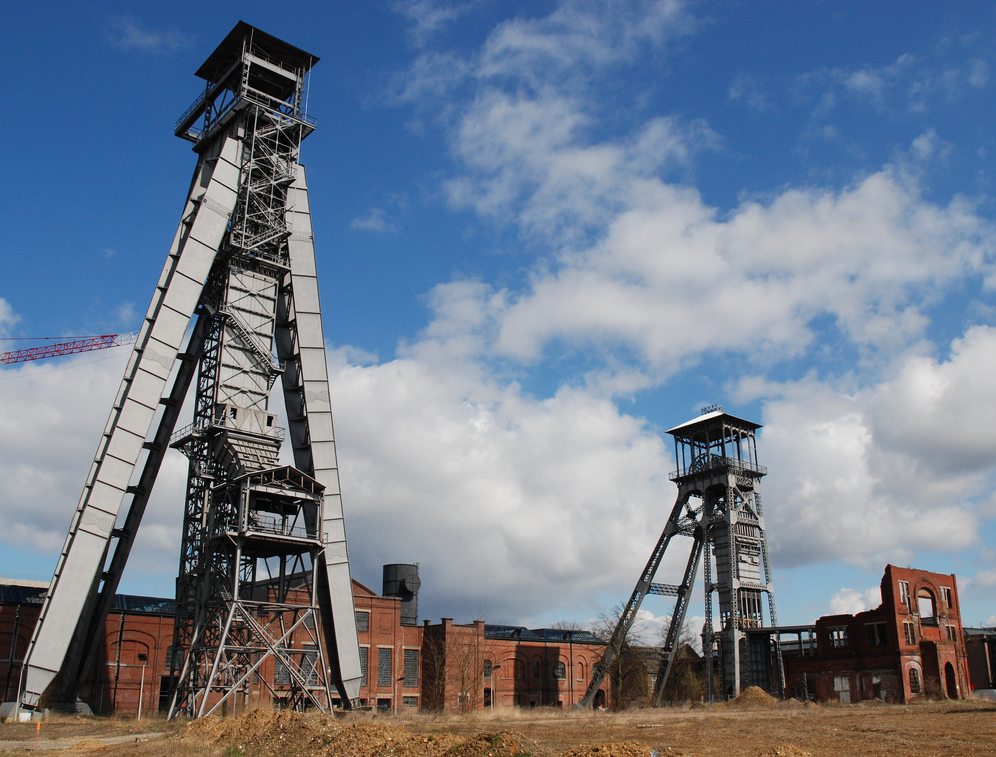 De steenkoolmijn van Winterslag, Genk, België